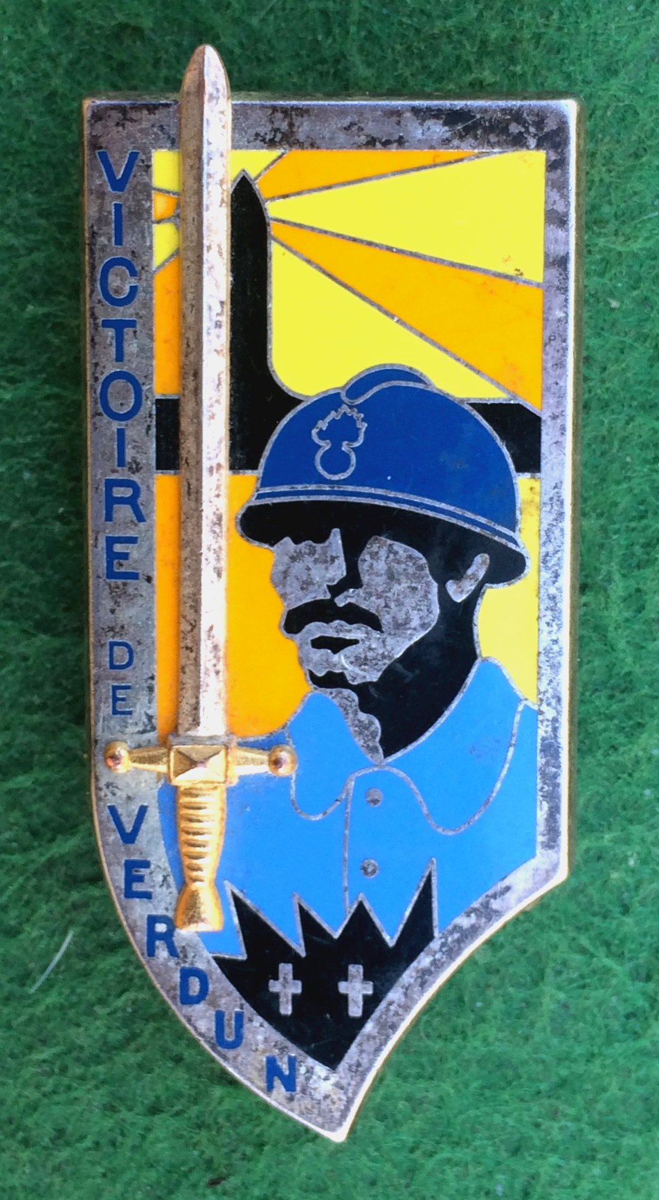 Insigne de la promotion du bataillon EOR de l'ESM Saint-Cyr Coëtquidan «Victoire de Verdun» (1986-1987). Il représente un poilu sur fond de l'Ossuaire de Douaumont, avec l'évocation de l'hécatombe et du sang versé dans l'enfer de Verdun (deux croix sur une flaque noire). Le rayon lumineux partant du haut de l'ossuaire évoque la mémoire qui éclaire l'avenir. L'épée symbolise l'école d'officier. Au verso figure la phrase suivante : «Courage on les aura» (Fraisse - Paris)